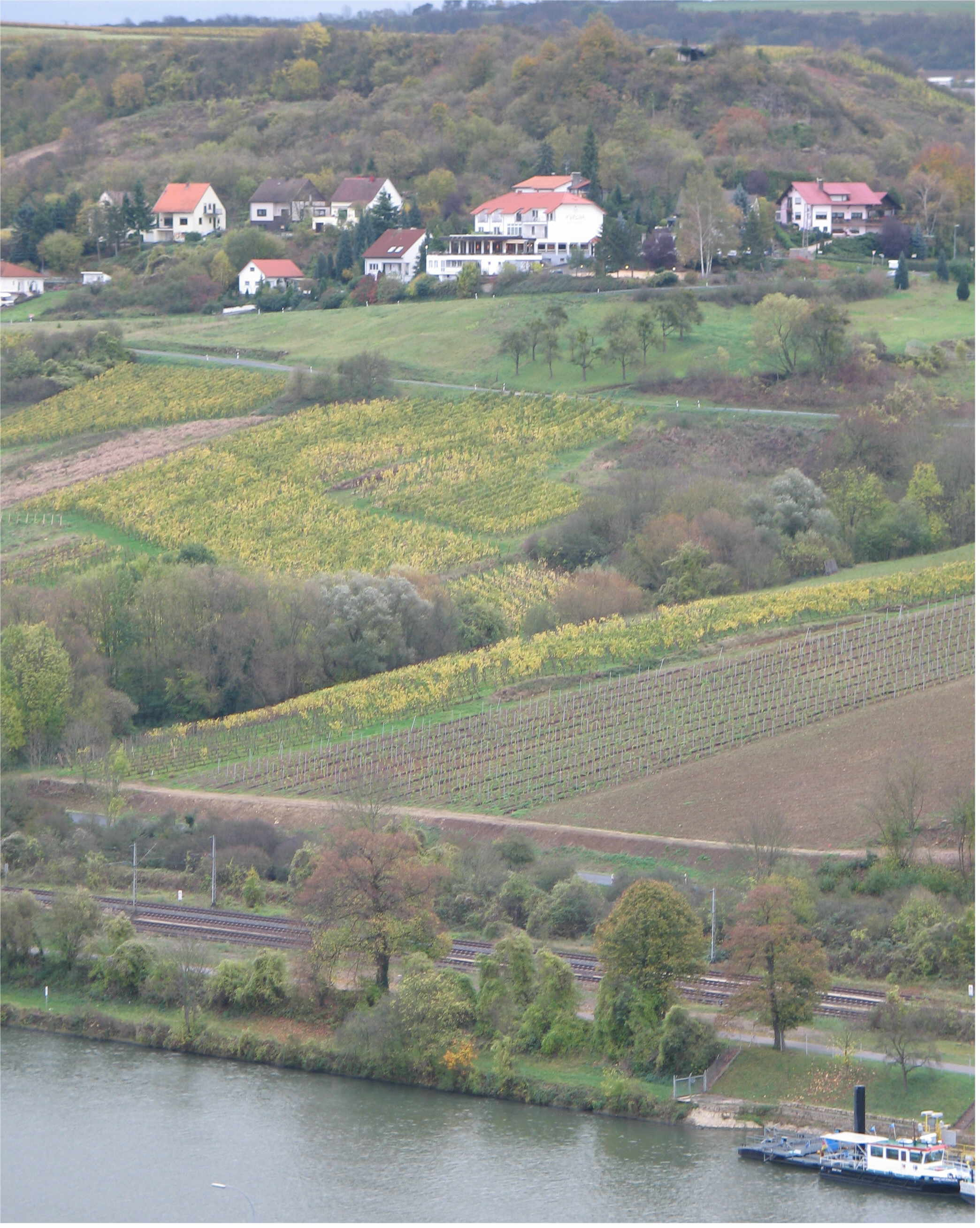 Wëncher (Wincheringen).